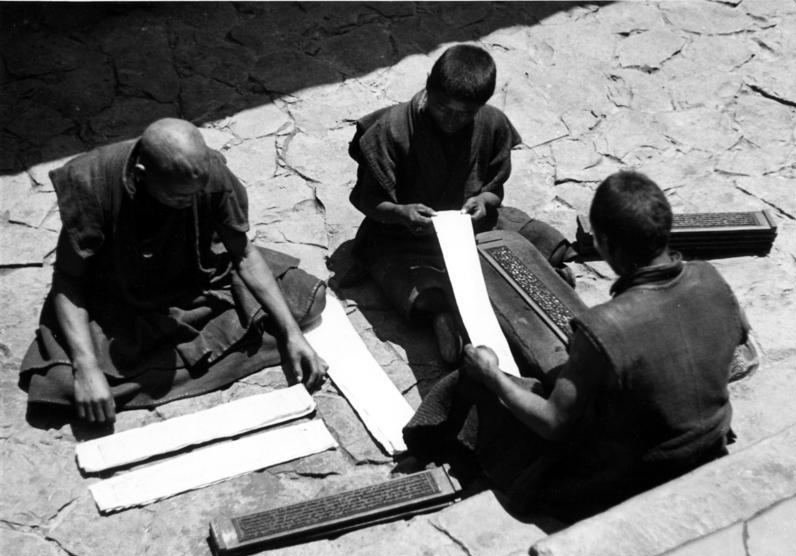 Taschilumpo [Tashilhunpo], Lamas beim Drucken von Büchern